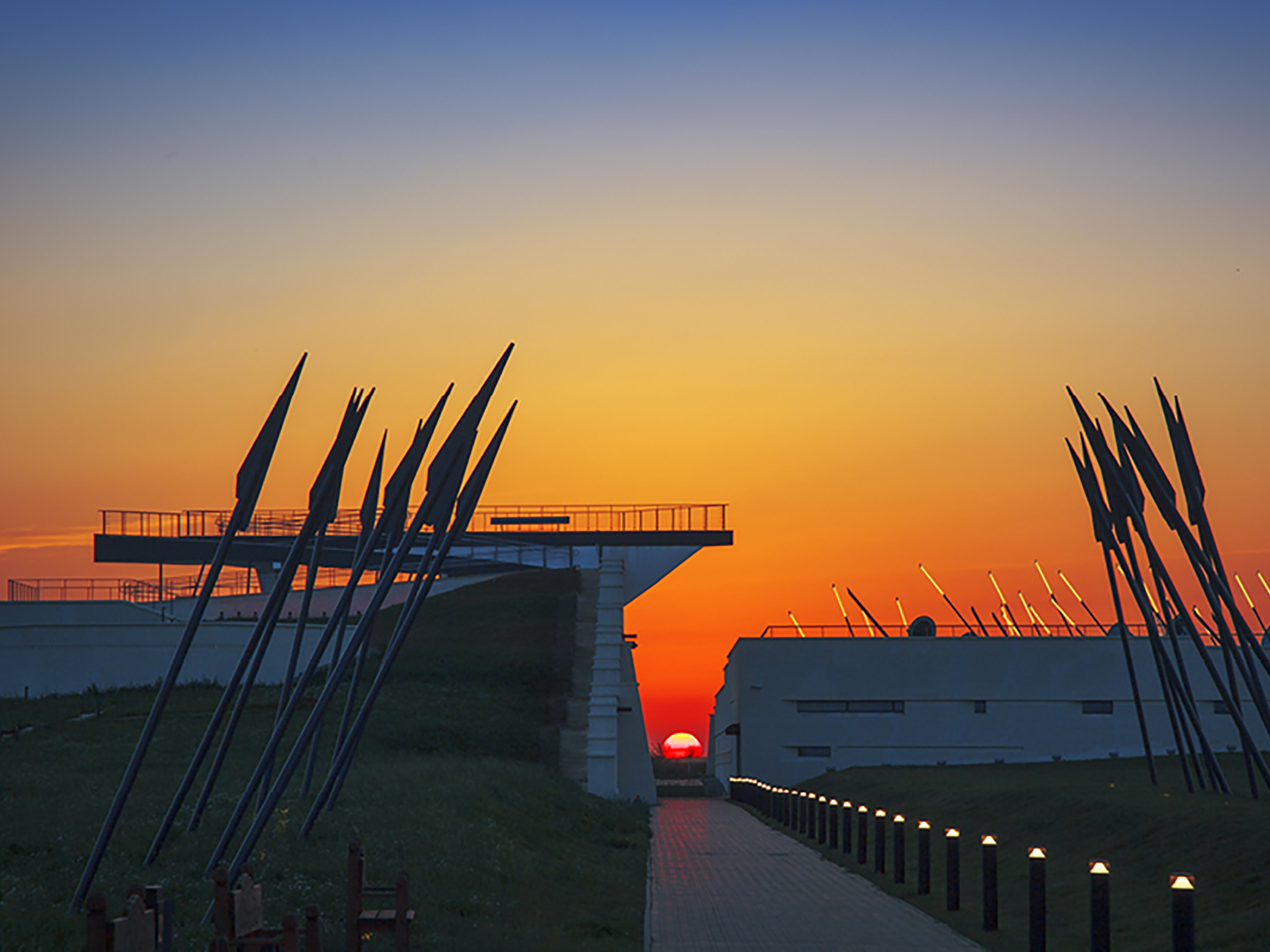 Здание музея построено в 2015 года, в 2016 году здесь открылась экспозиция